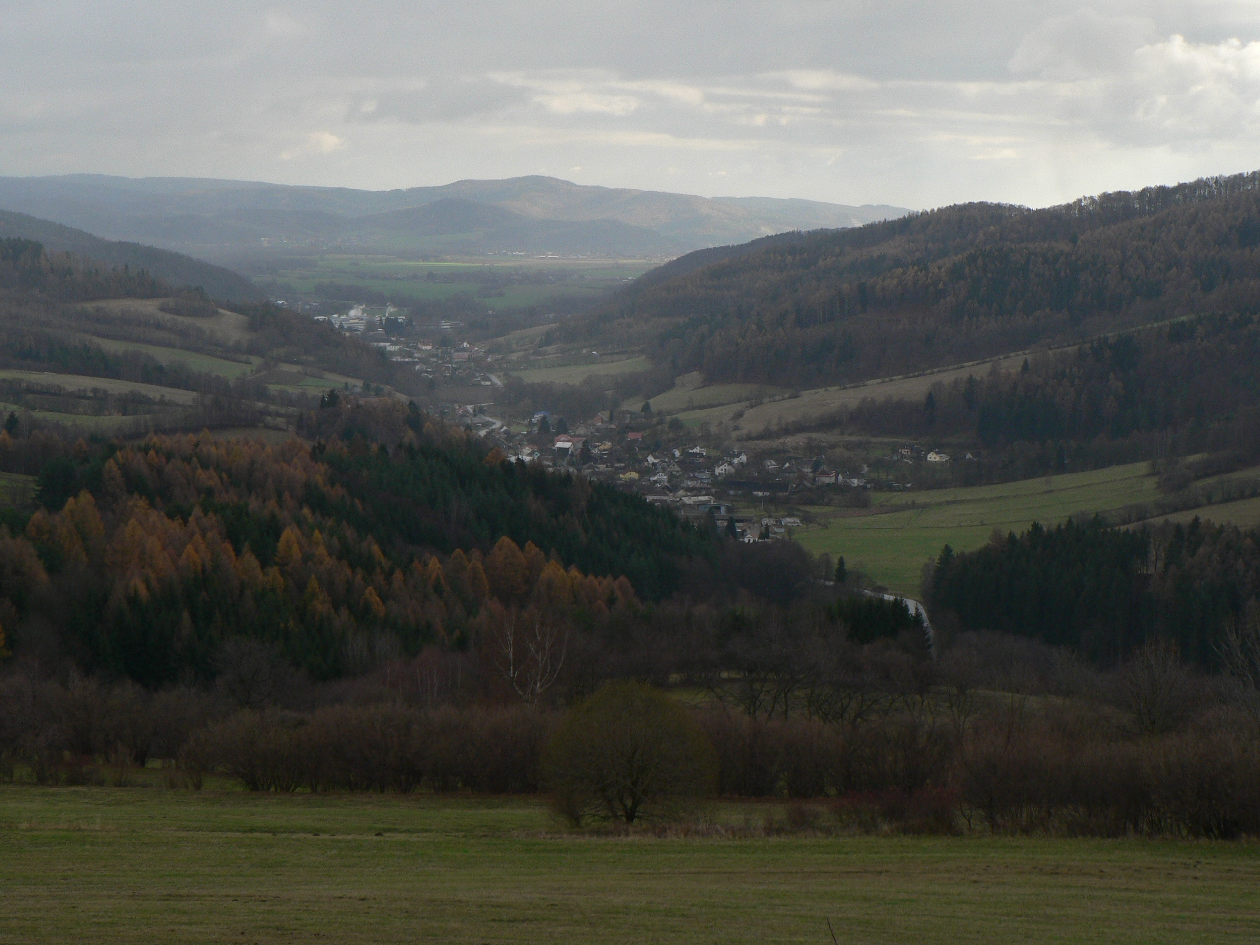 Pohled na Bušín od Jakubovic (v pozadí Olšany)